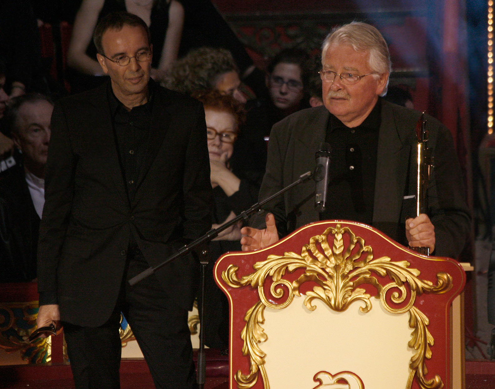 Jossi Wieler und Frank Baumbauer, ausgezeichnet für die Beste deutschsprachige Aufführung, während der Verleihung des Nestroy-Theaterpreises 2009 (Circus Roncalli auf dem Wiener Rathausplatz).